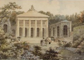 L'hôtel de Brunoy, par Etienne-Louis Boullée. Aquarelle gouachée, plume et encre noire - 16 x 22 cm. Brunoy, Musée Municipal. Acquis à la vente de dessins d’architecture de la collection Lefuel, Paris, Hôtel Drouot, 26 juin 2008, Etude Millon & Associés.